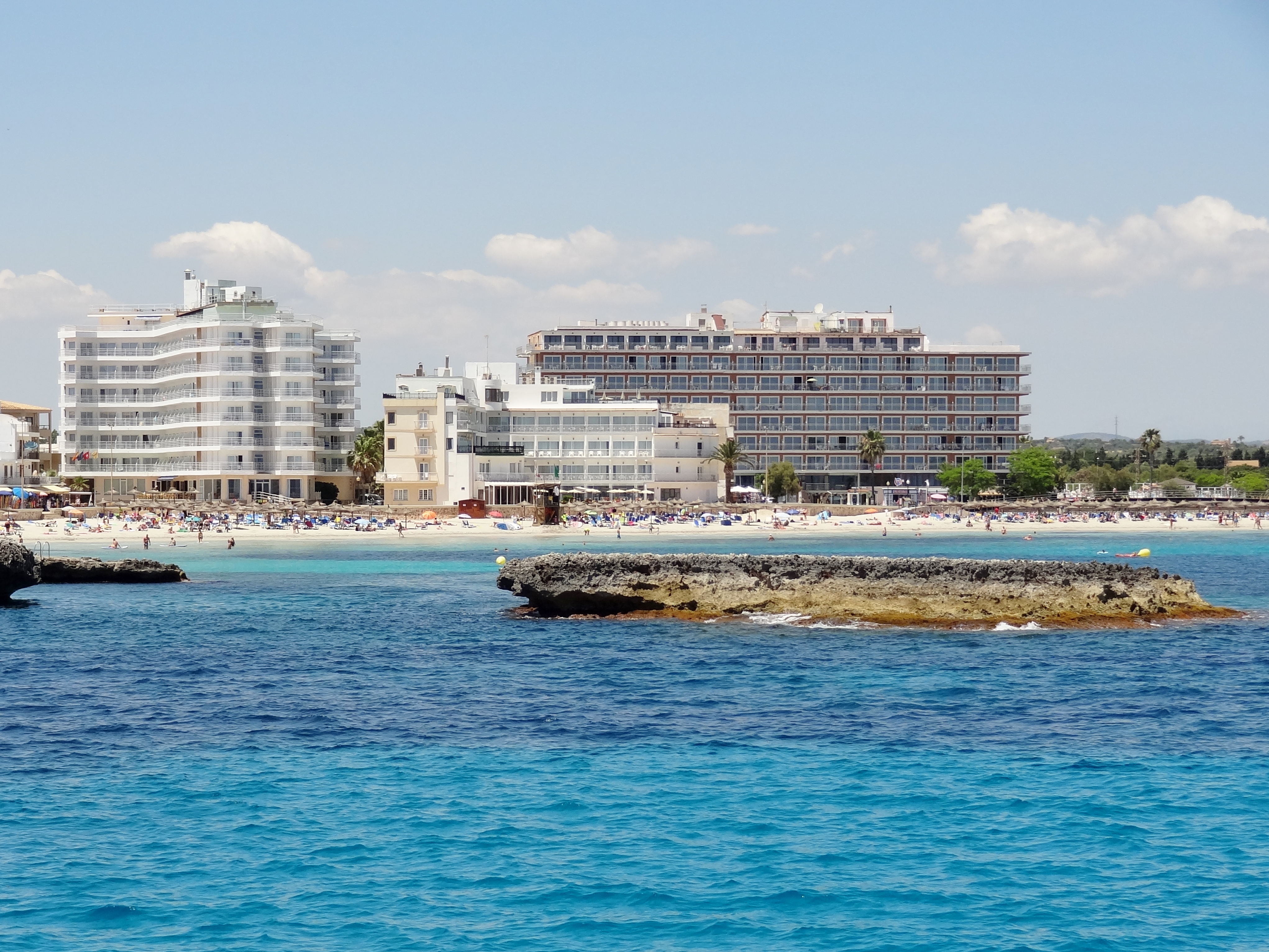 Insel vor der Cala Moreia in S’Illot in der Gemeinde Manacor, Mallorca, Spanien